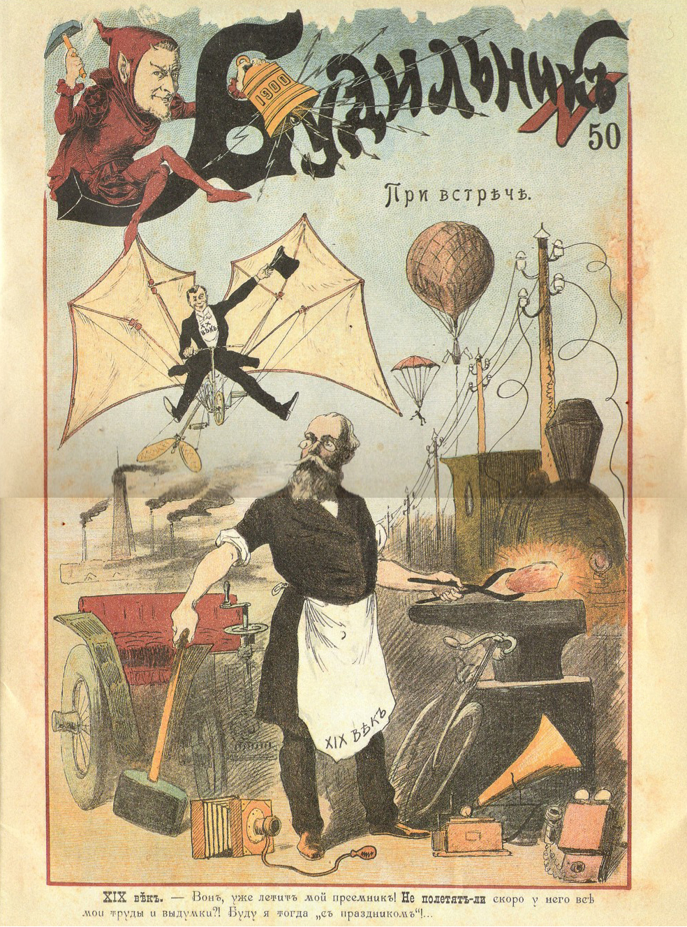 Обложка журнала "Будильник" # 50 за 1899 год. 20-й (воздушный) век летит на смену кузнечно-паровозному (19-му).